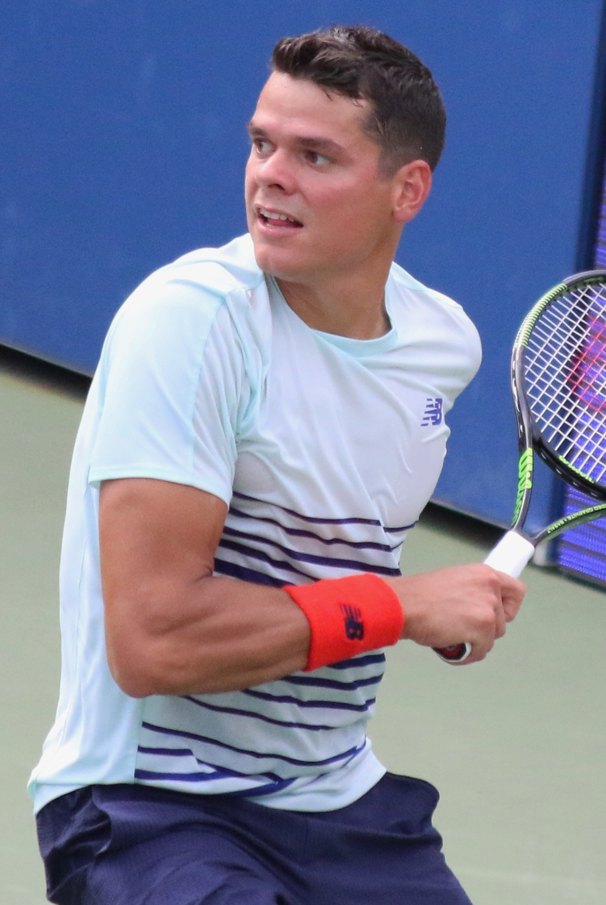 Raonic US16 (60)